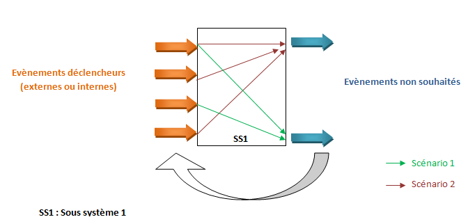 Schématisation sous forme de boite noire (MOSAR)